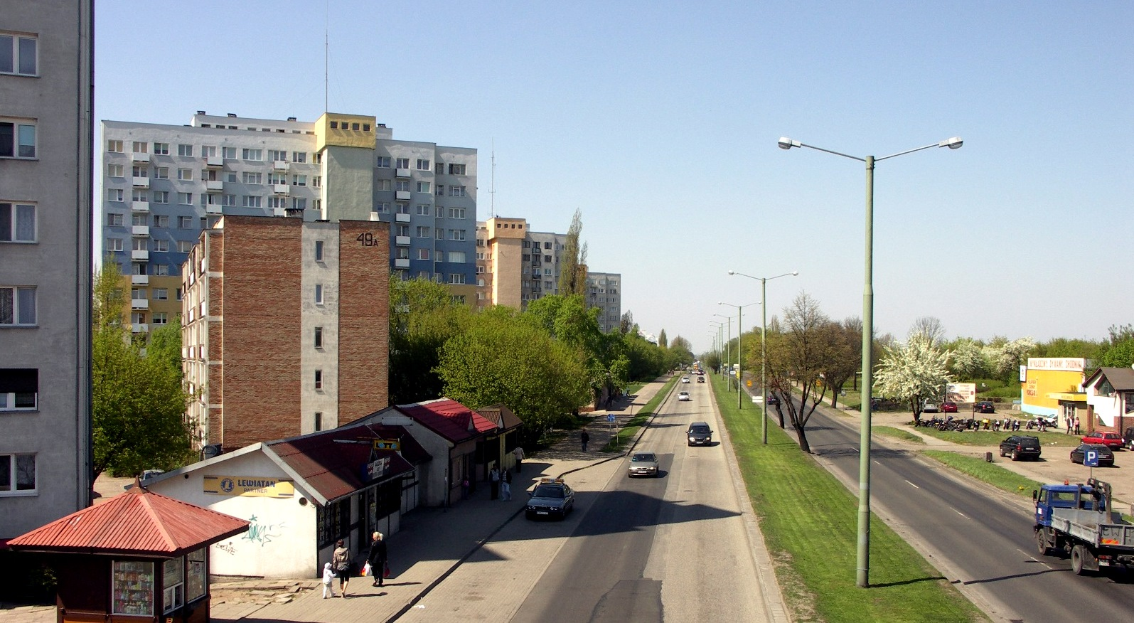 Bloki Wzdłuż DK 1 we Włocławku